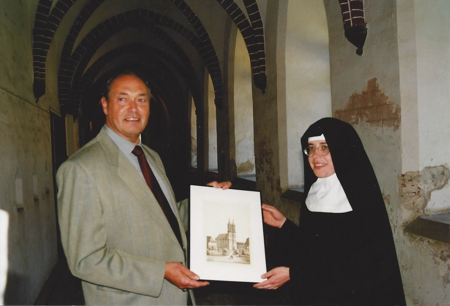 Horst Alsleben und eine Benediktinerin im Kloster Dobbertin